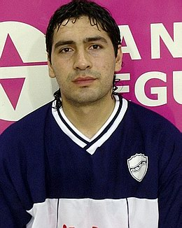 Foto leonardo gutierrez, Argentina.